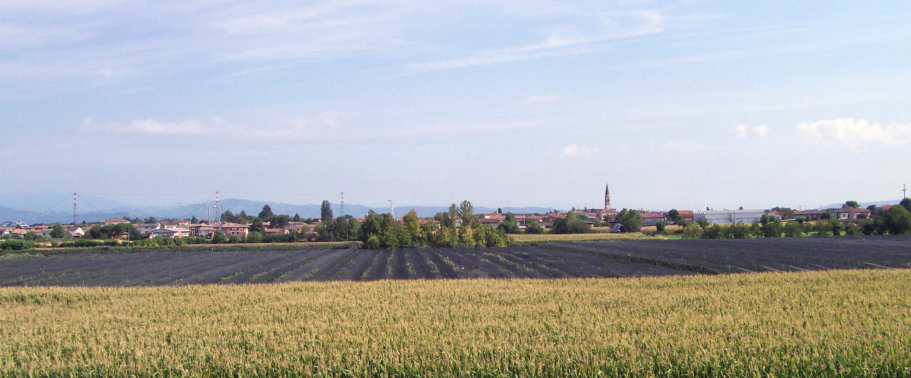 Veduta di Albaredo d'Adige dall'argine del fiumge Adige.